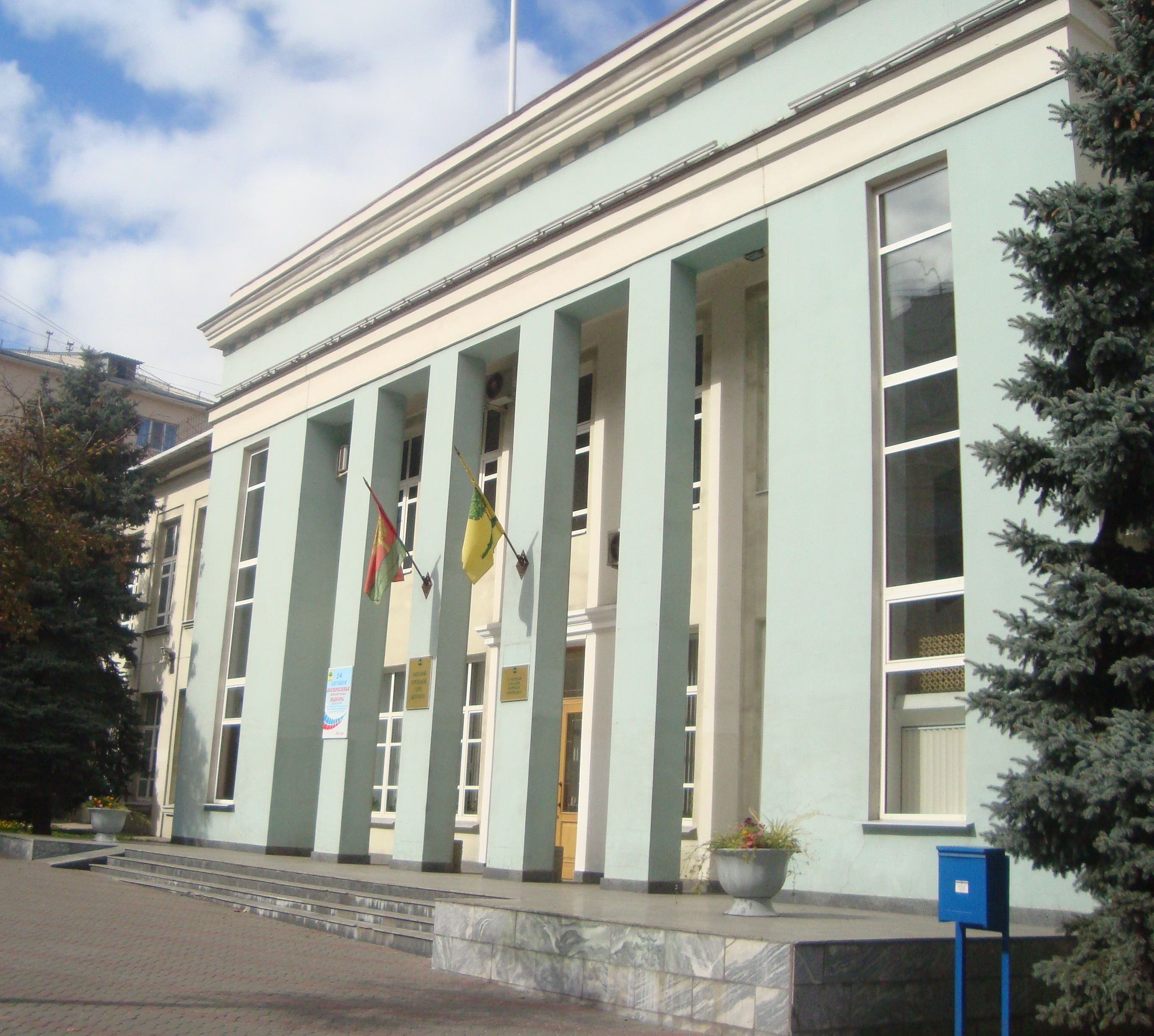 Липецк. Советская ул., 22